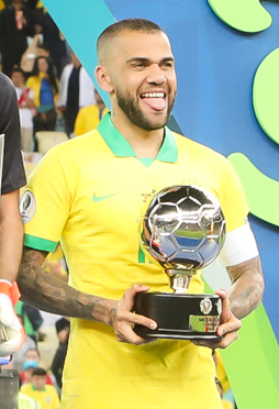 (Rio de Janeiro - RJ, 07/07/2019) Presidente da República, Jair Bolsonaro, e o Presidente da Confederação Sul-Americana de Futebol (CONMEBOL), Alejandro Domínguez, durante entrega da premiação da Copa América 2019. Foto: Clauber Cleber Caetano/PR